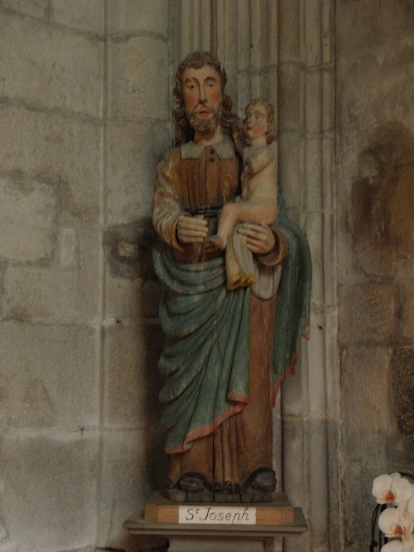 Statue de Saint-Joseph et l'Enfant Jésus en la cathédrale Saint-Paul-Aurélien de Saint-Pol-de-Léon (29).